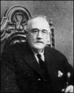 Marcos_del_Torniello